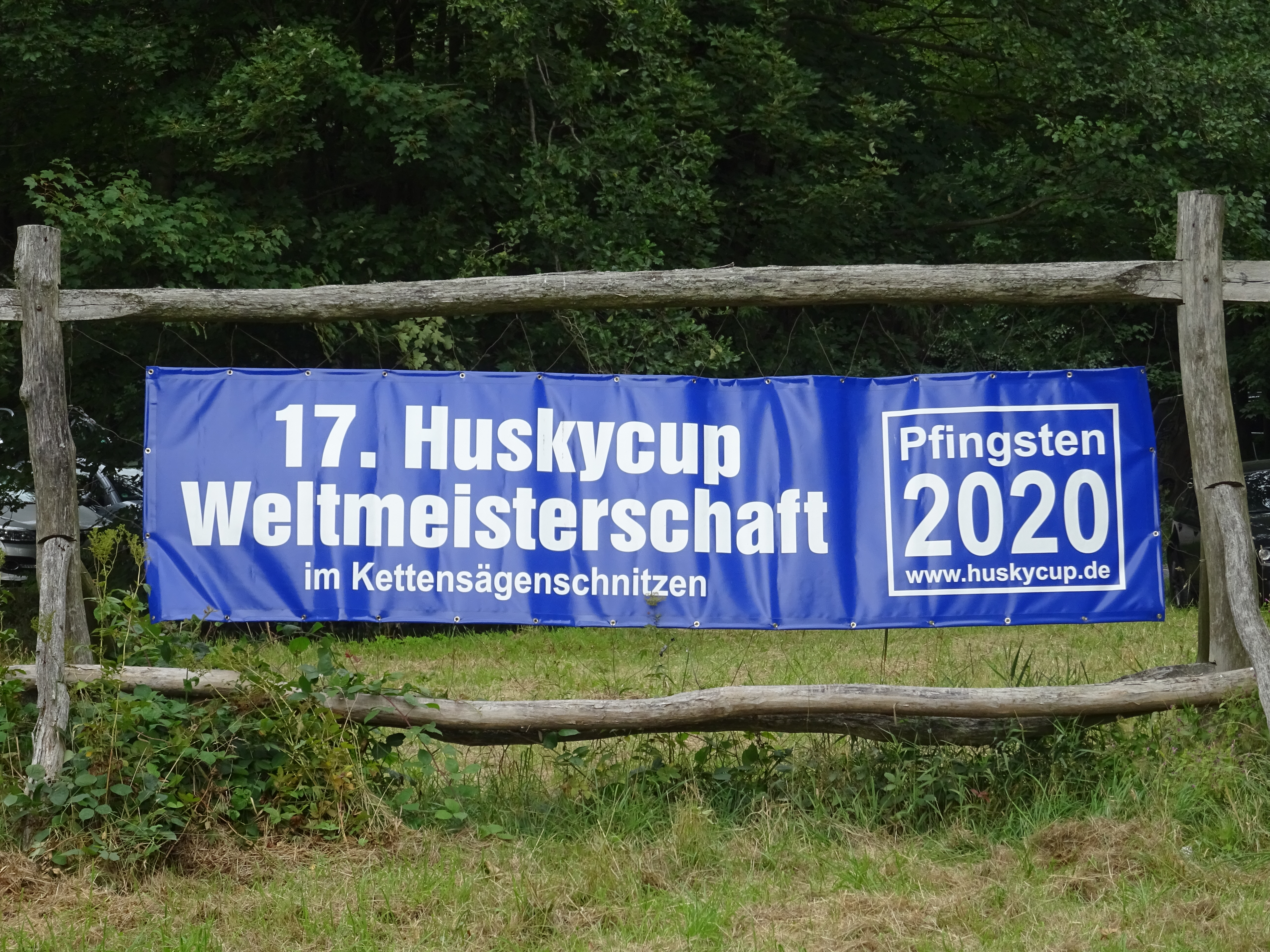 Blockhausen: Kettensägen-Schnitzen